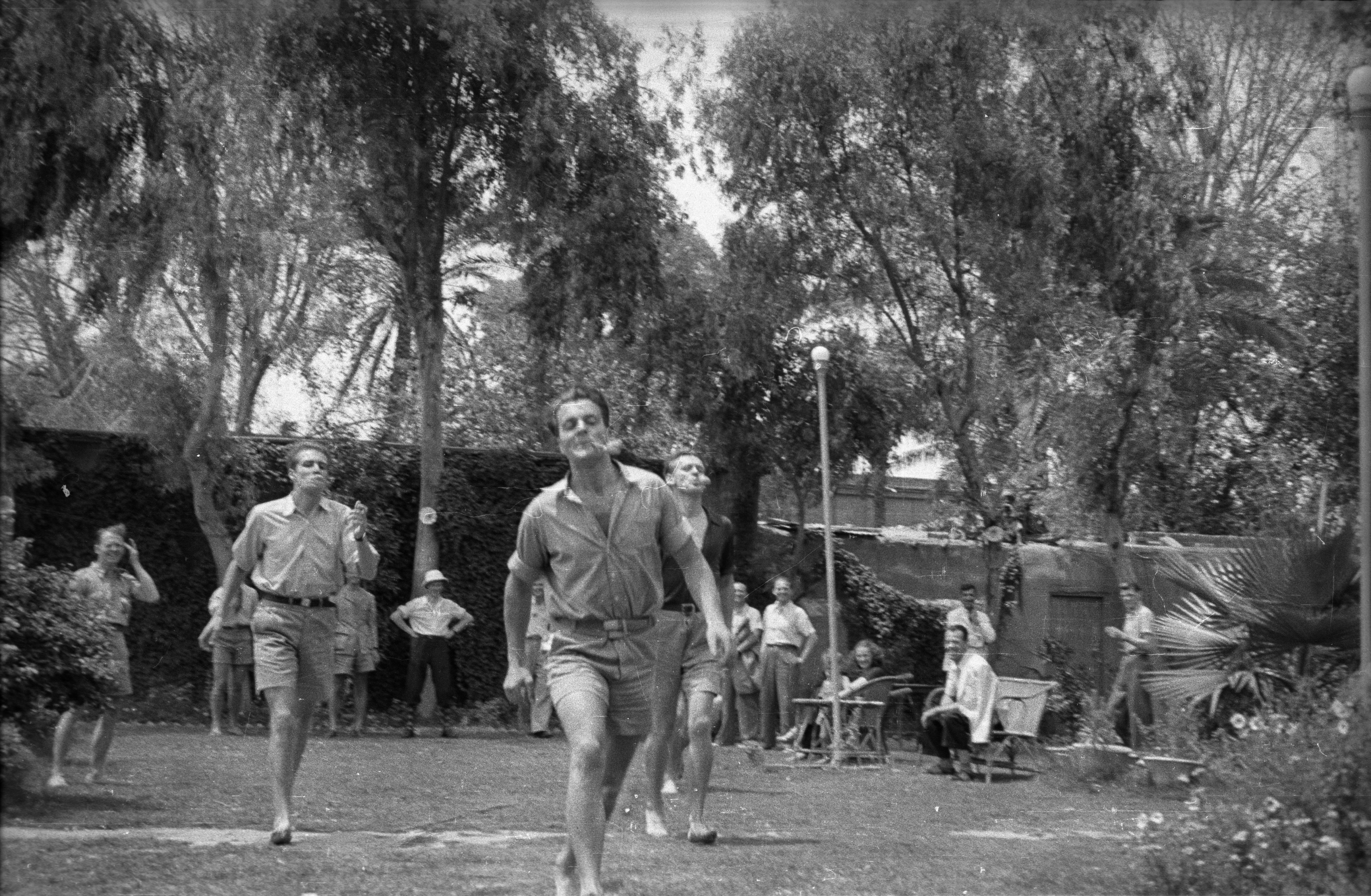 17. mai-leker i Istanbul. Fra en serie med fotografier i albumet: "Istanbul-Iran-Irak-India-Ceylon". Istanbul, Tyrkia